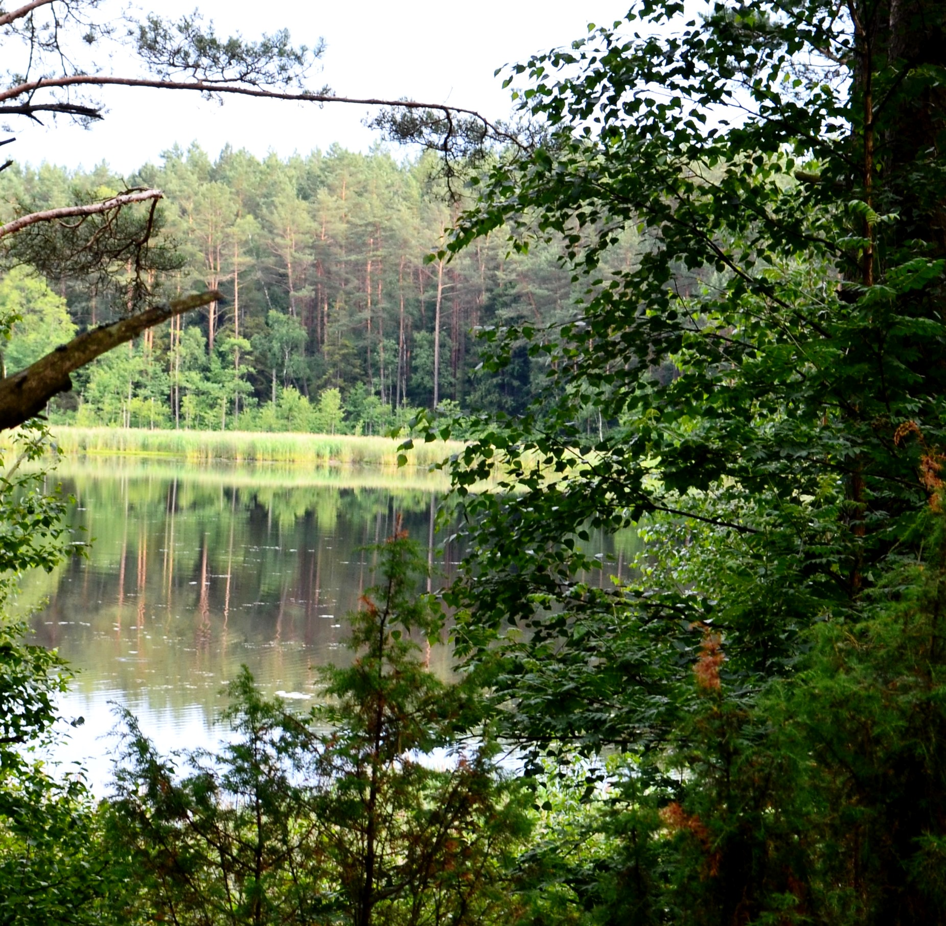 Ežeras Juodis, Šilas, Vilnius